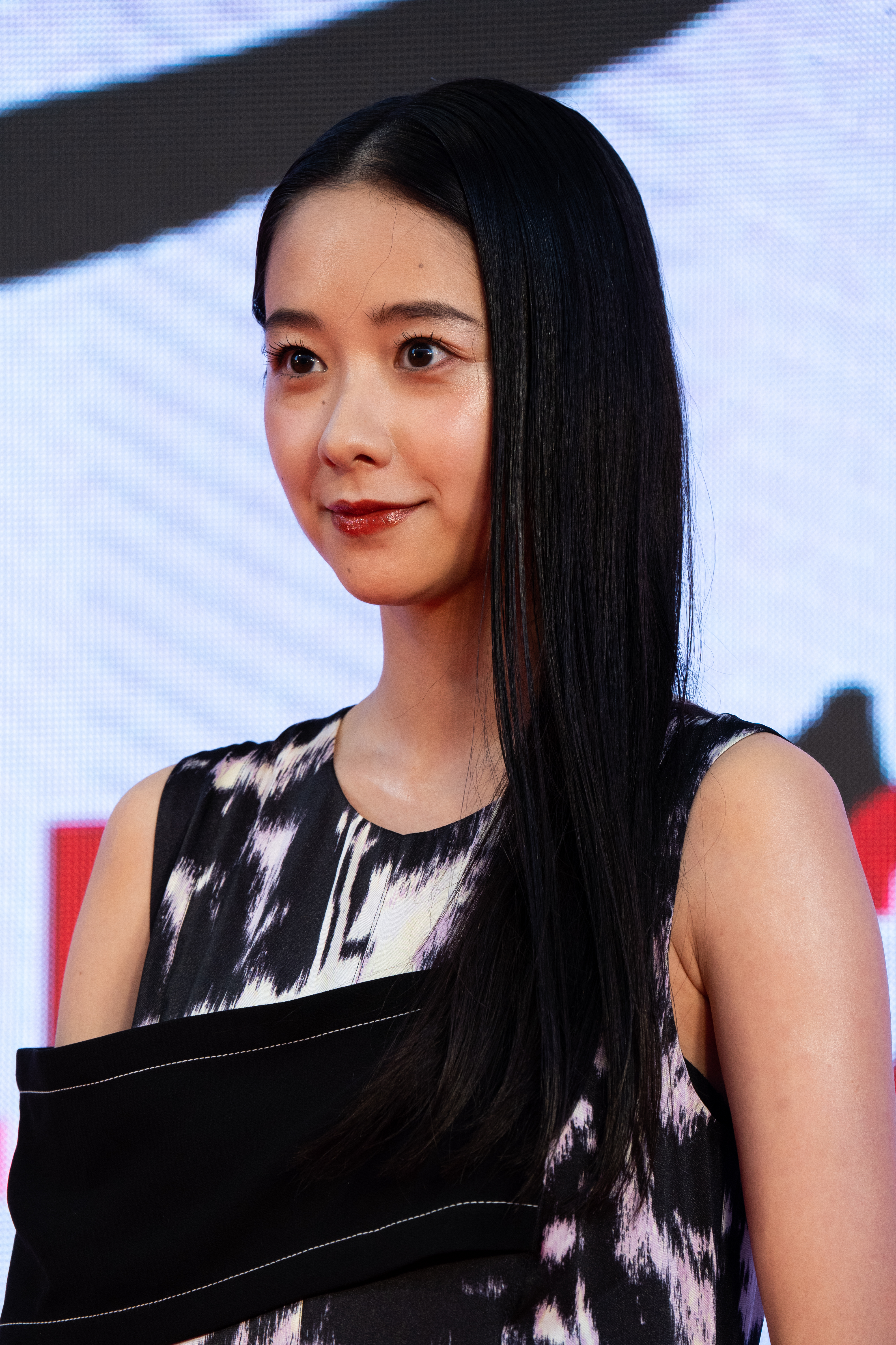 第32回 東京国際映画祭 オープニングセレモニー 堀田真由 (殺さない彼と死なない彼女)